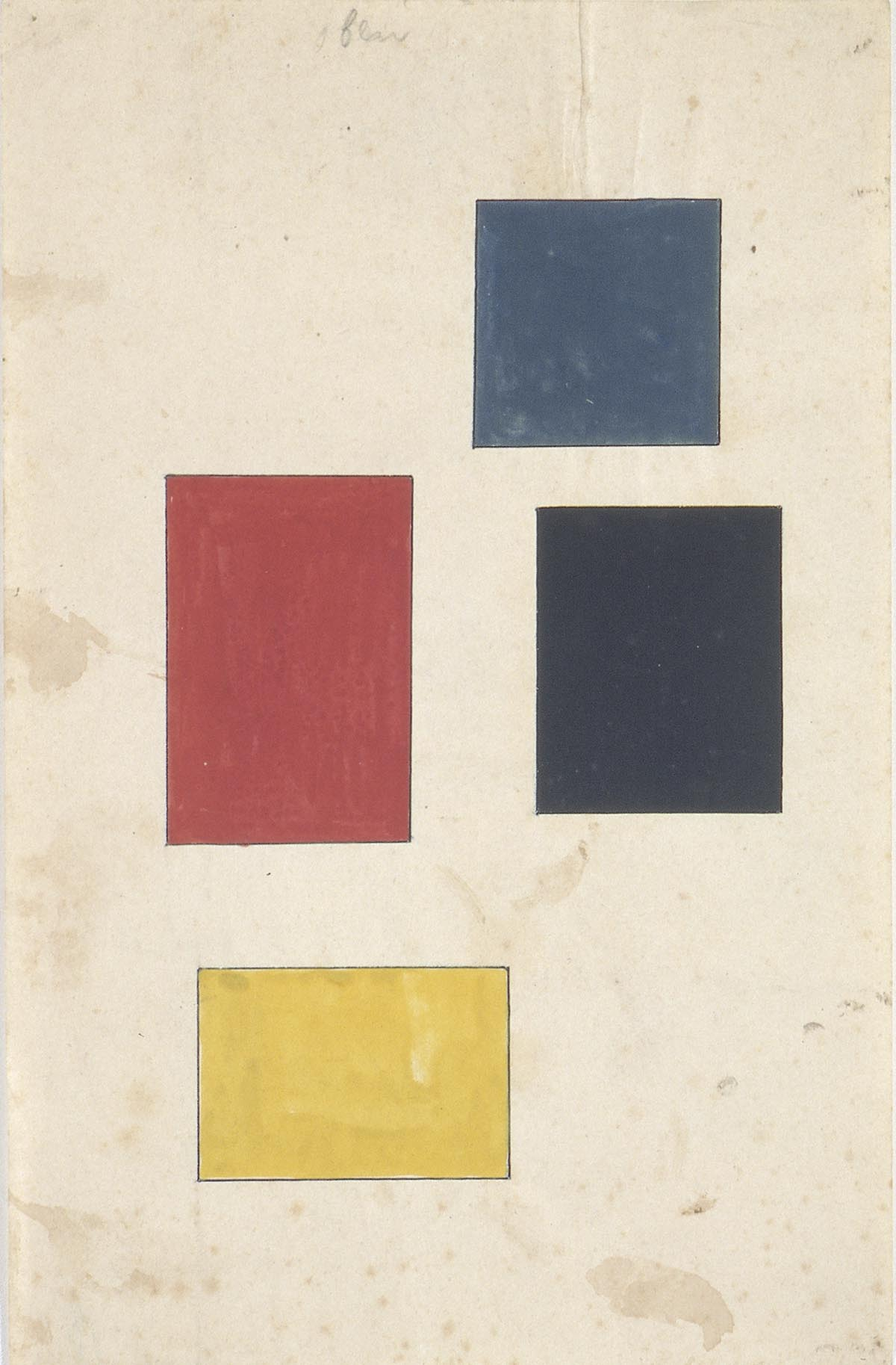 Grondelement van de schilderkunst. Inkt en gouache. 22,5 × 14,5 cm. Amsterdam, Instituut Collectie Nederland. Inventory number AB5101.